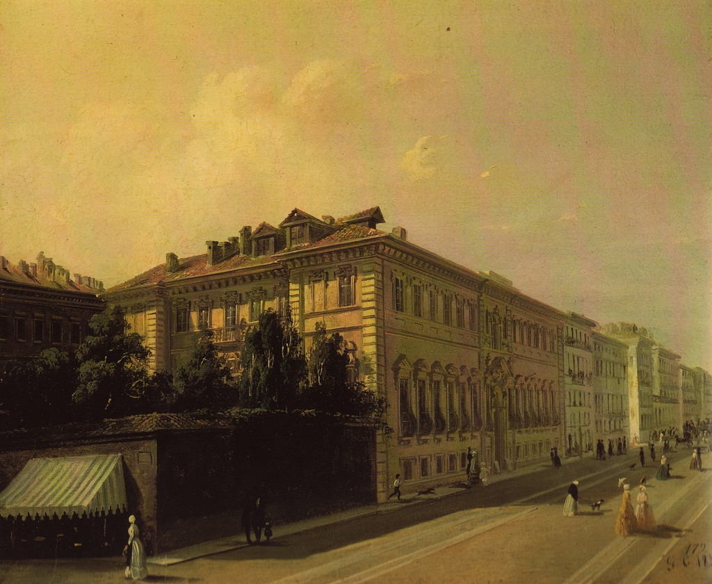 Palazzo Taparelli d'Azeglio, Torino, Italia